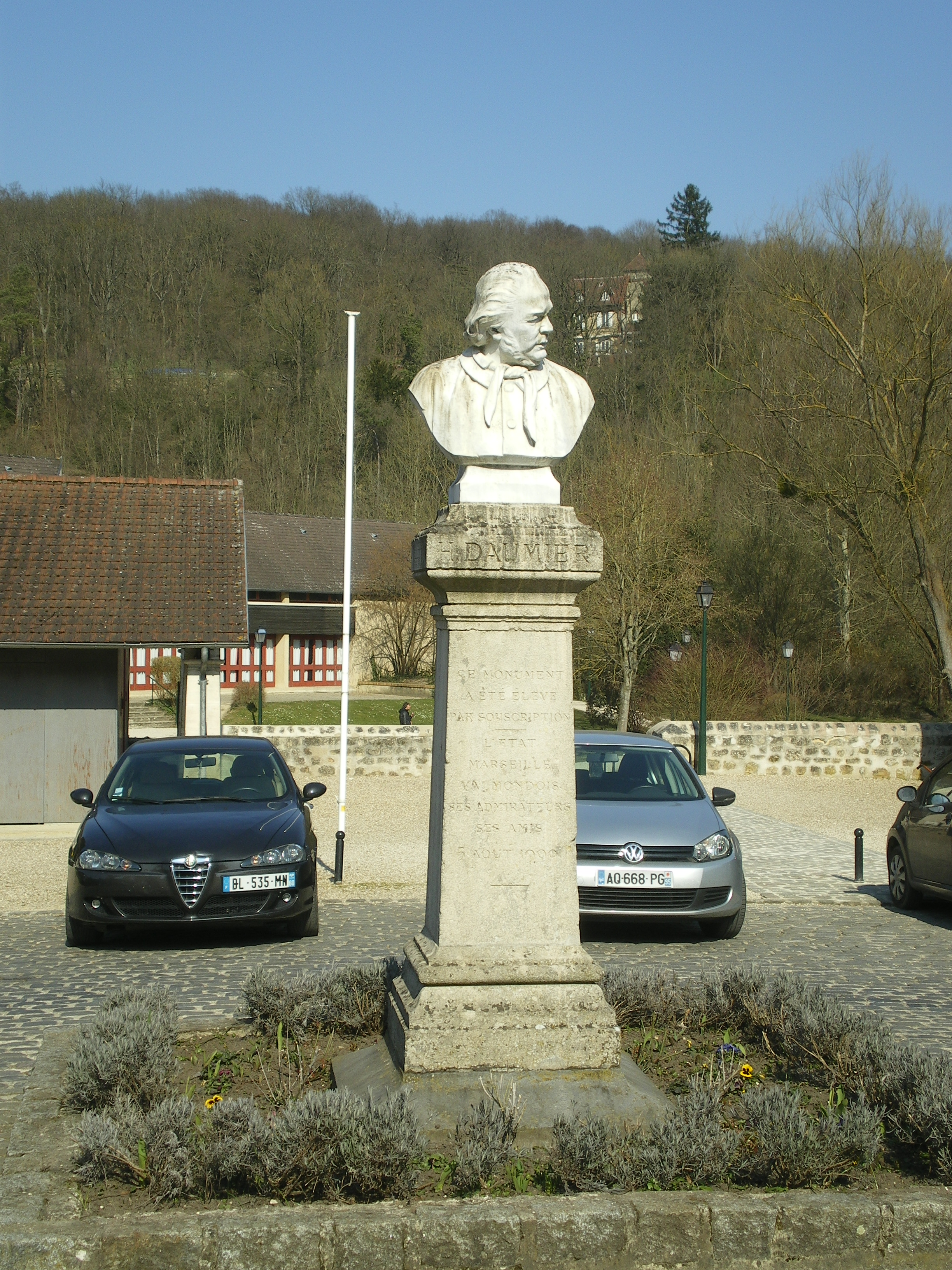 Buste d'Honoré Daumier derrière la Mairie